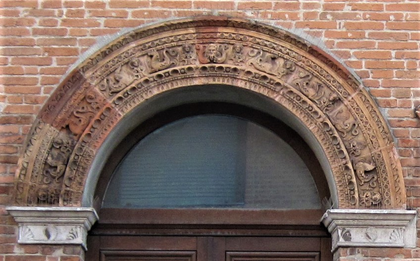 Casa di Biagio Rossetti in via XX Settembre 152 a Ferrara. Arco sul portale di accesso.